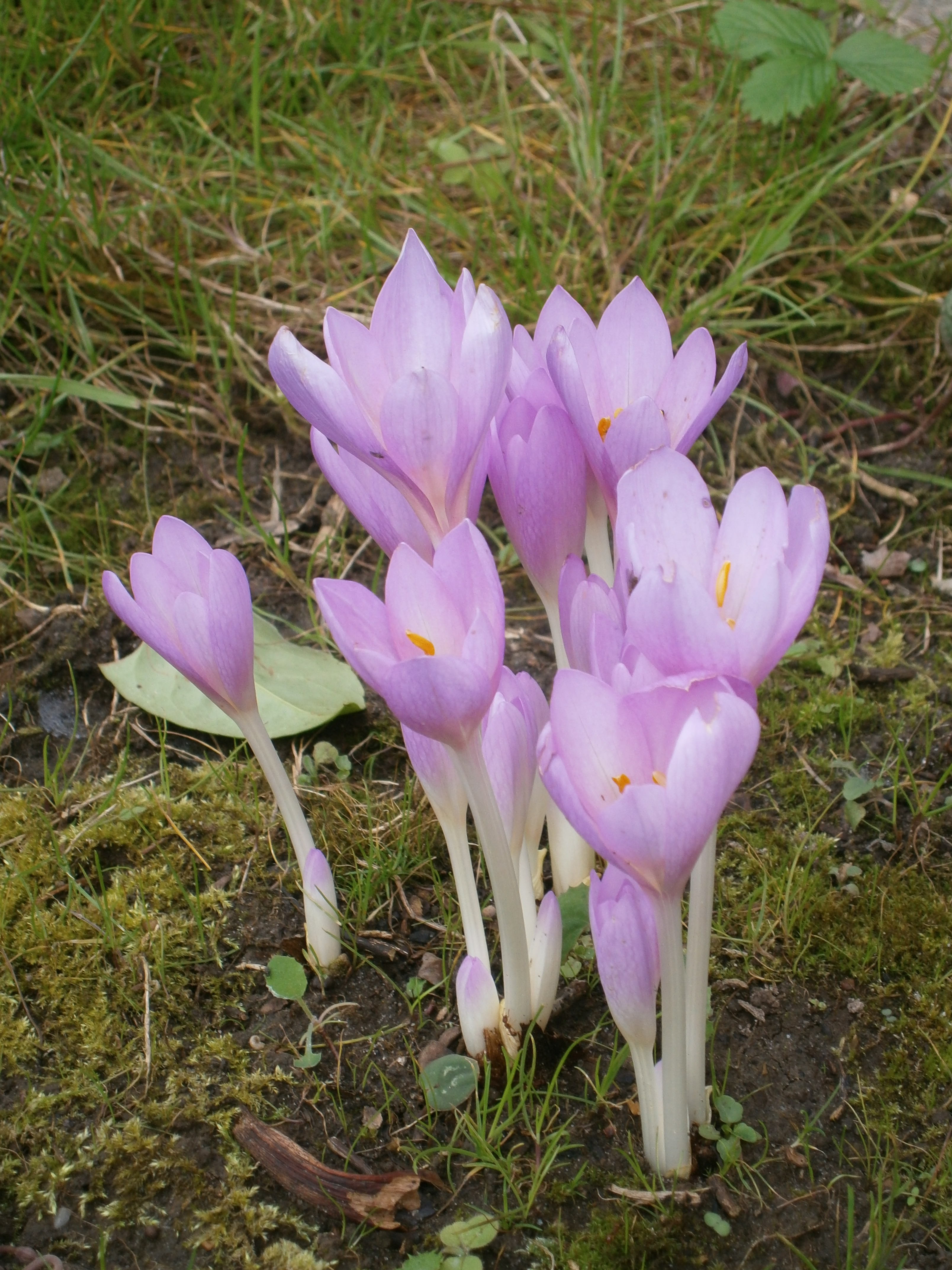 Colchicum autumnale clump